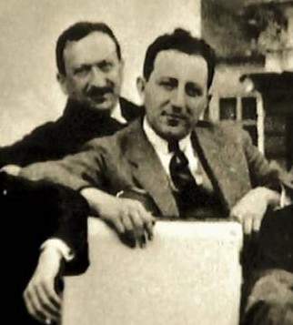 Harry Jelínek v meziválečném období